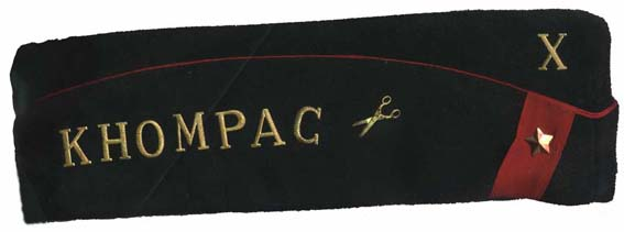 Photo d'un Khalot